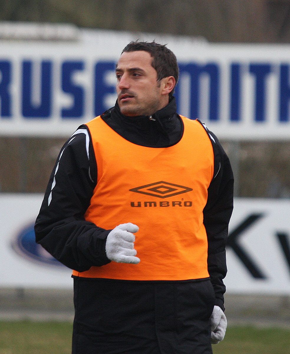 Berat Jusufi